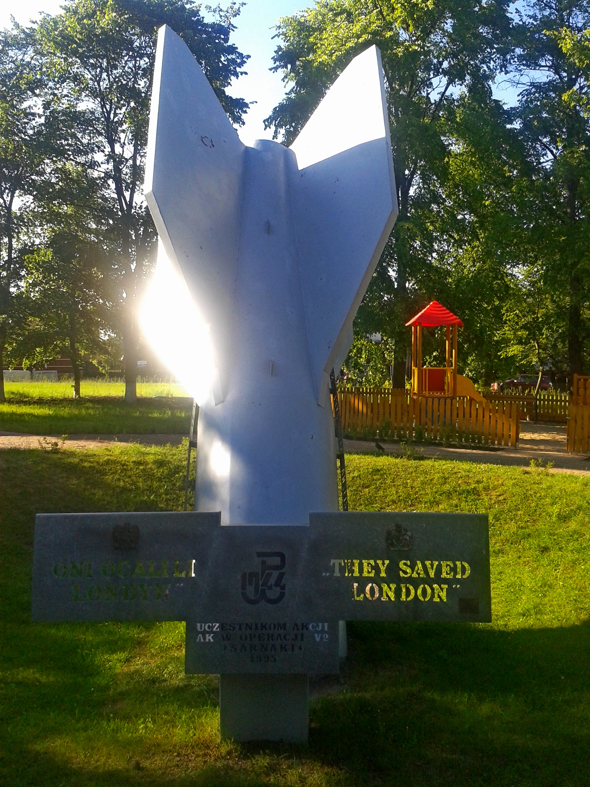 Makieta pocisku rakietowego V2 w centrum Sarnak